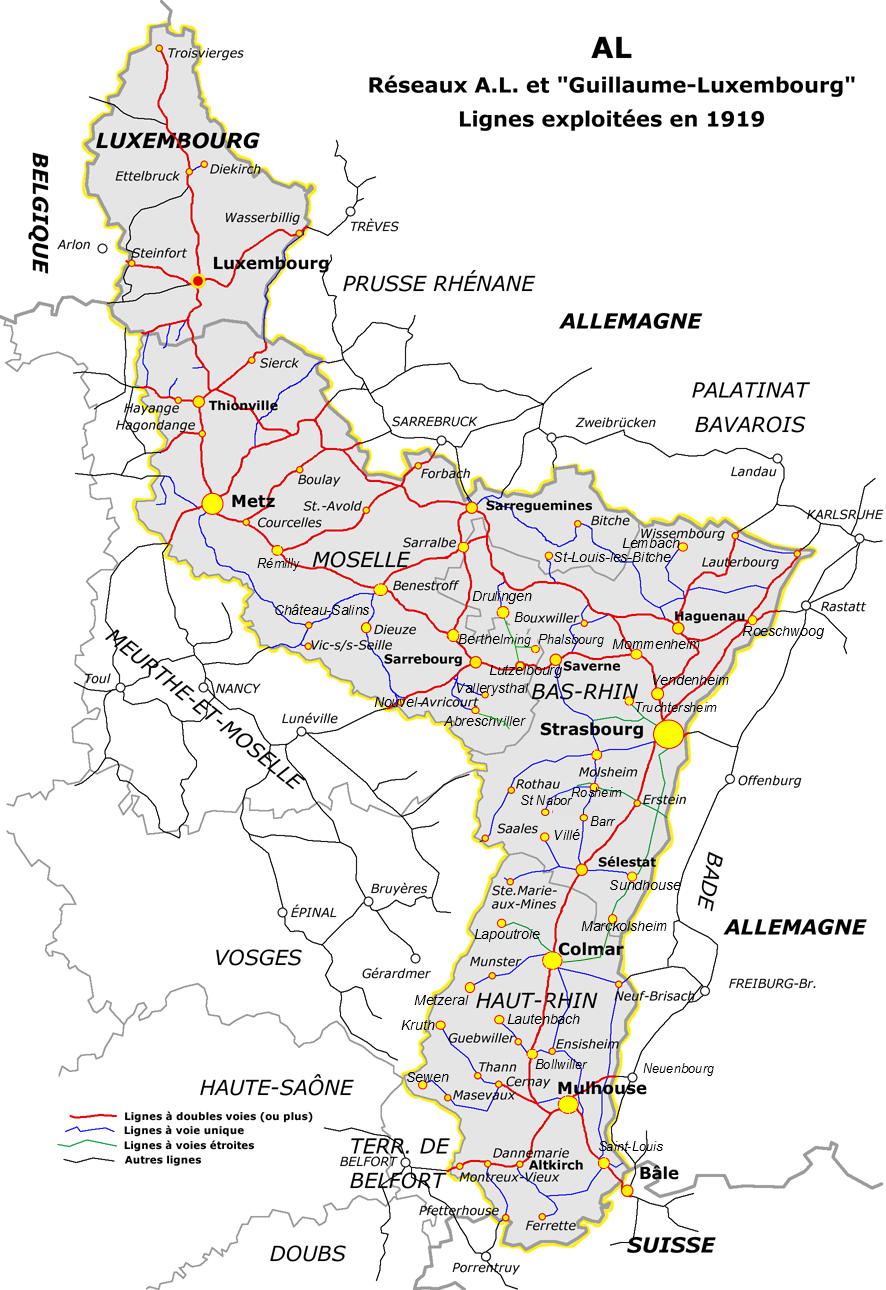 Carte du réseau Alsace-Lorraine à sa création en 1919